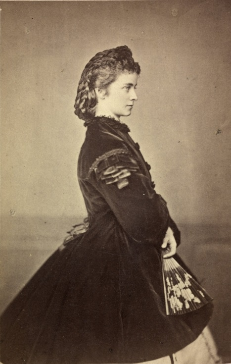 Prinzessin Sophie in Bayern-Birkenfeld